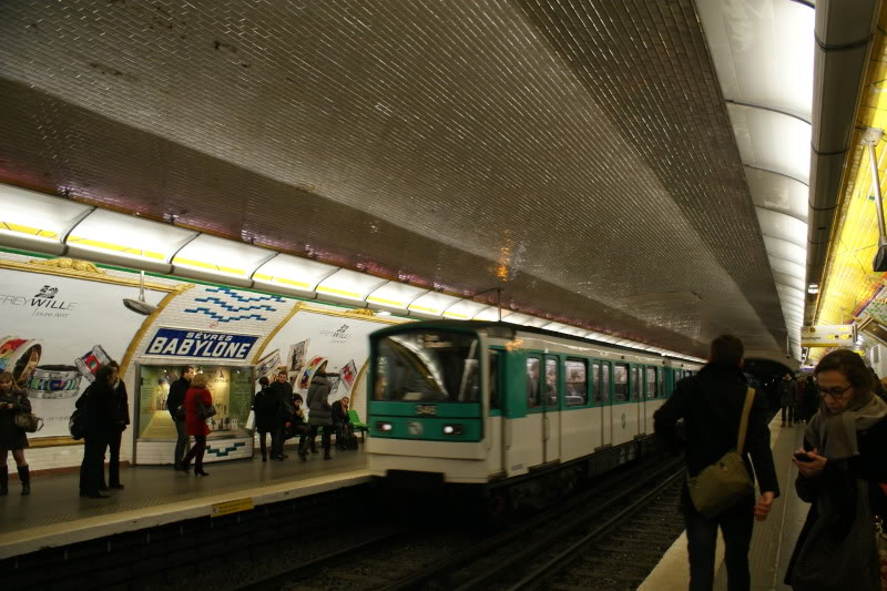 Le MF 67 sur la ligne 10 du métro de Paris.